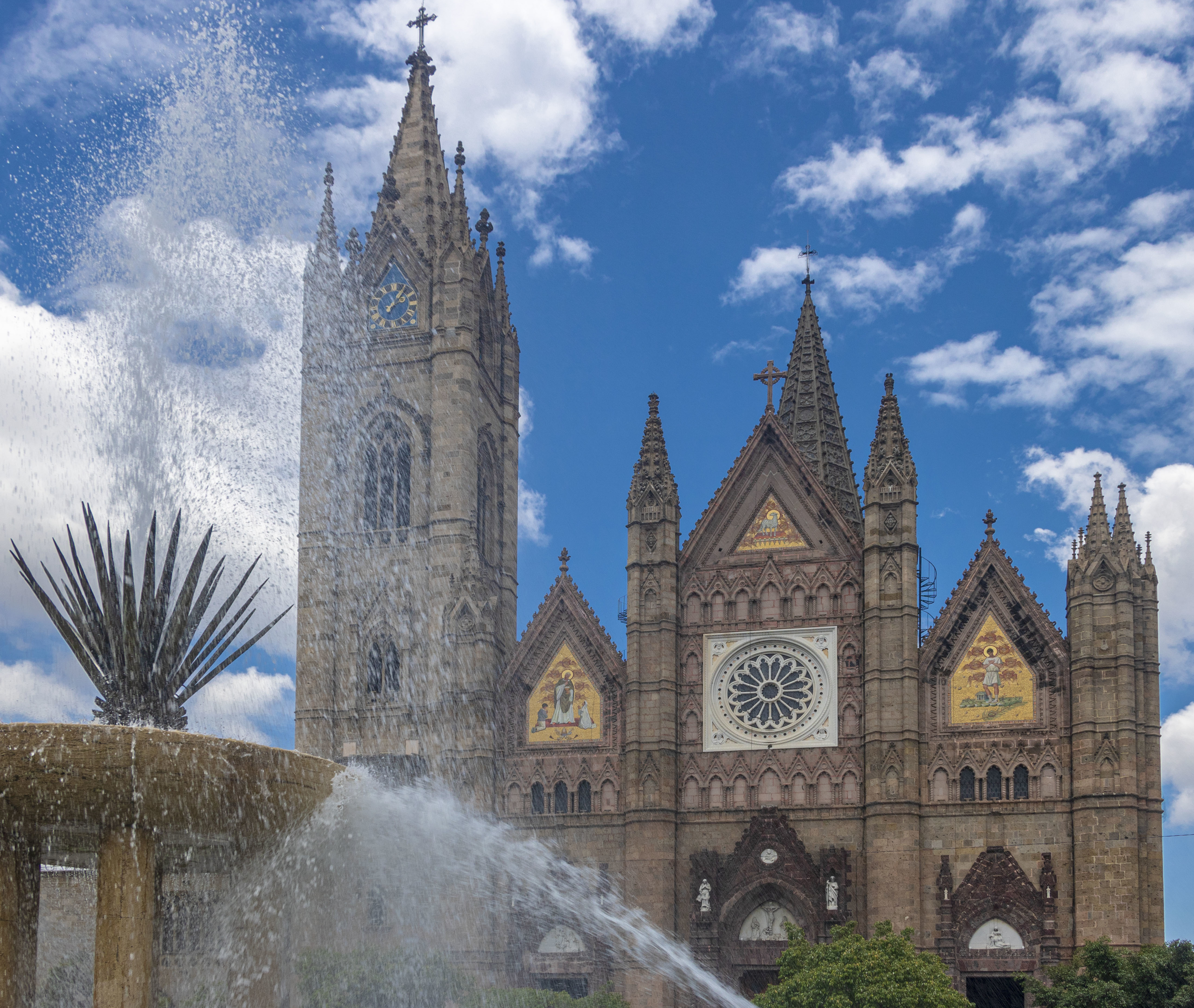 fachada del templo expiatorio del santo sacramento